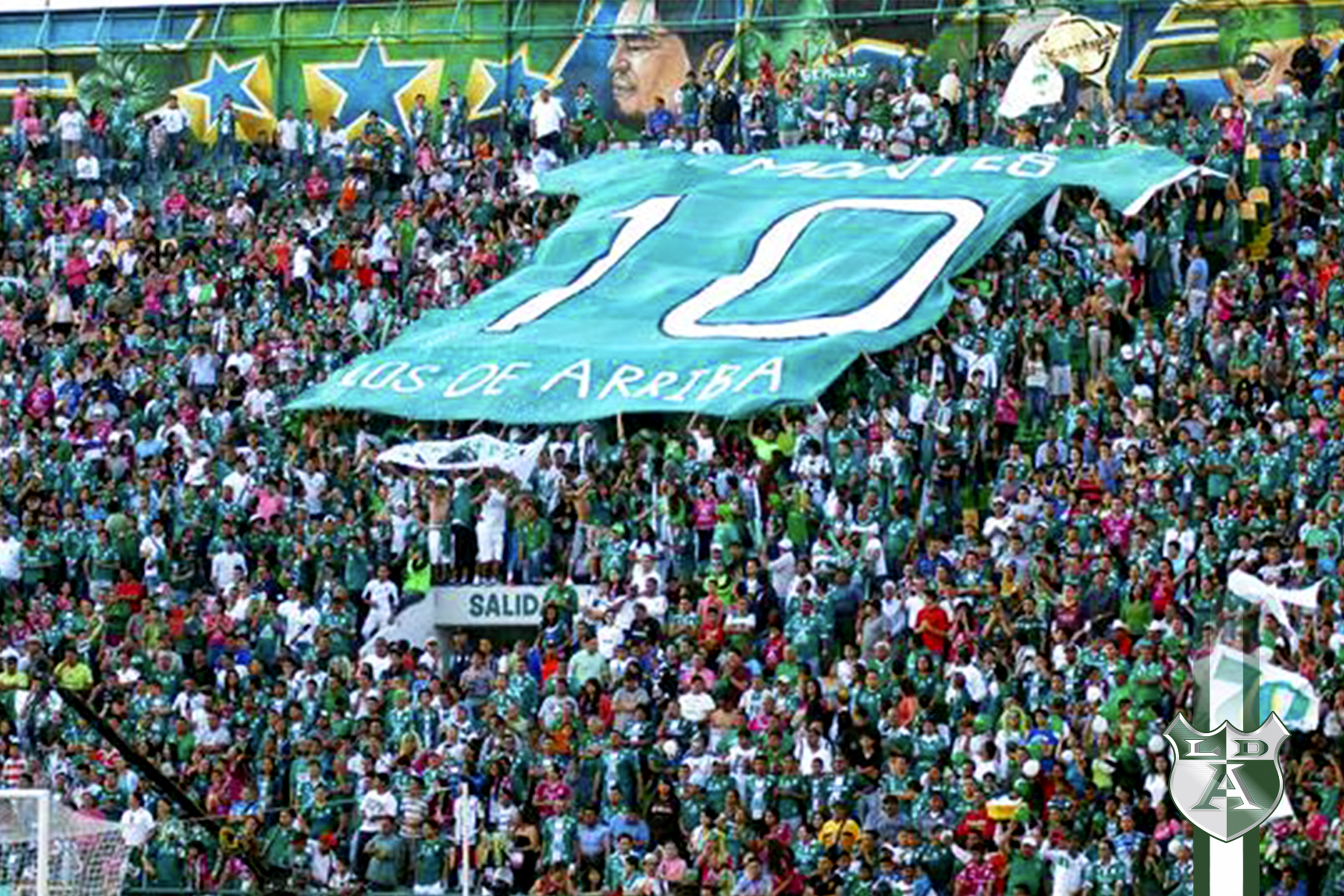 La barra despliega una playera gigante dedicada al Chapo, en apoyo por su lesión.